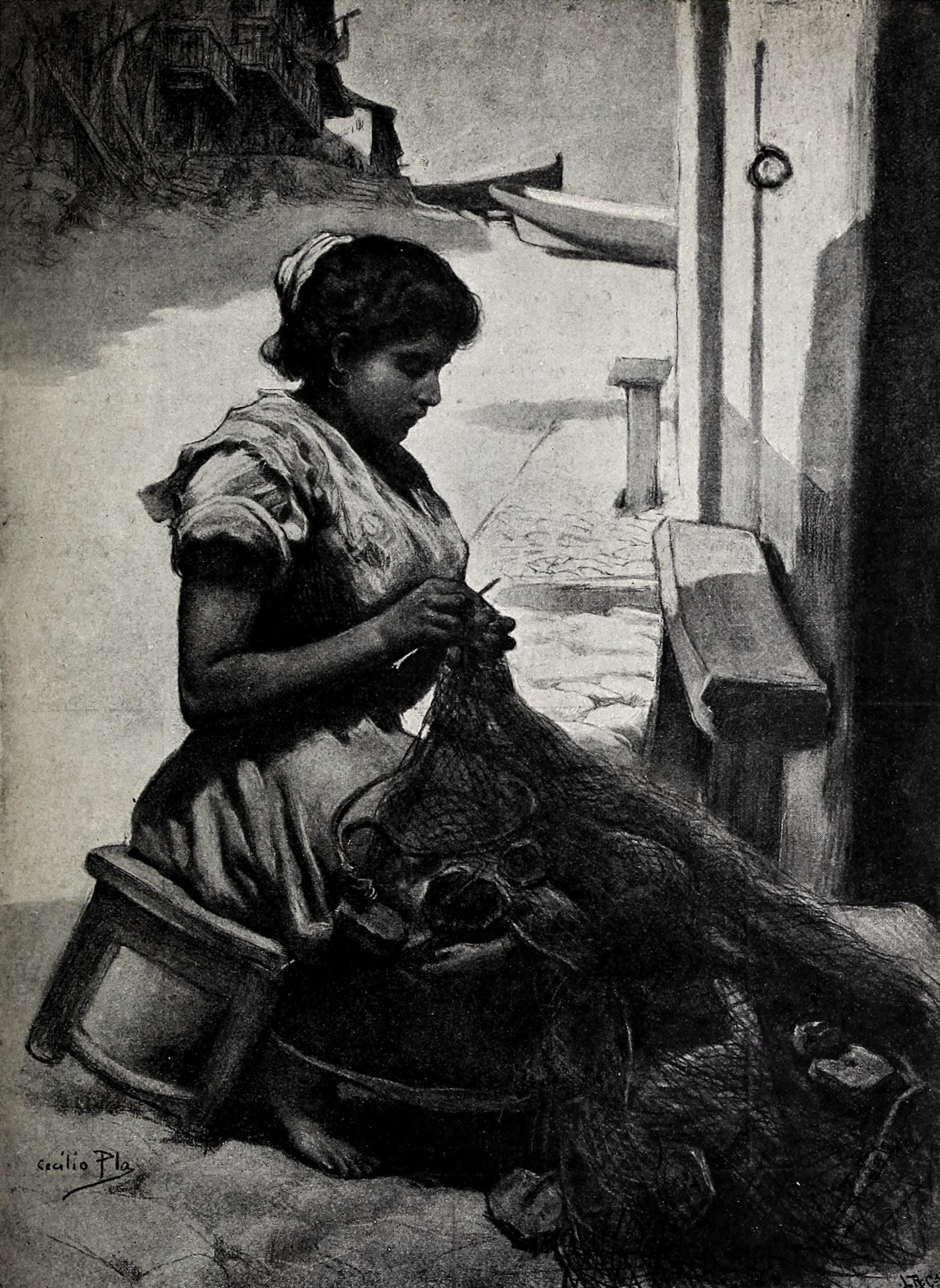 Creaciones femeninas VII. Sotileza.